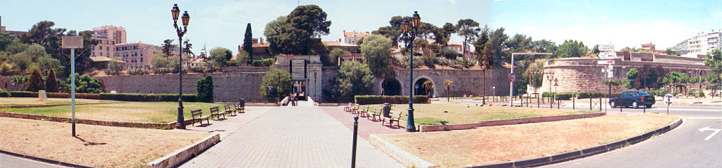 Toulon - La porte d'Italie